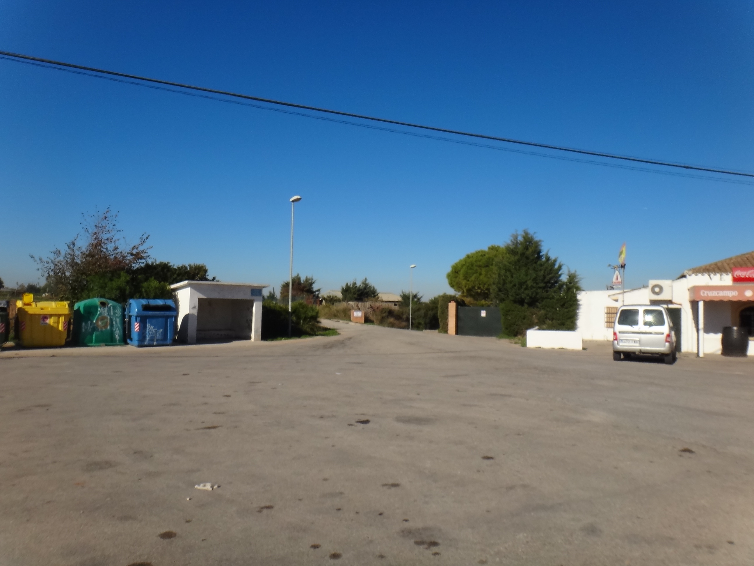 Entrada a la Barriada Rural Las Pachecas. Jerez (Andalucía, España)